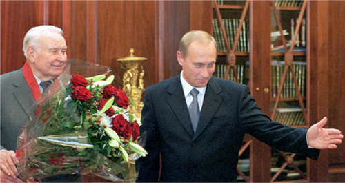 МОСКВА, КРЕМЛЬ. Церемония вручения выдающемуся российскому футболисту Константину Бескову ордена «За заслуги перед Отечеством» II степени.